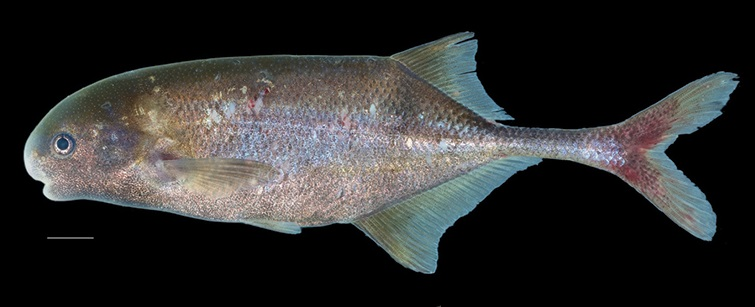 Ivindomyrus marchei, hembra, 135 mm, río Sébé, Gabón. Sullivan JP, Lavoué S, Hopkins CD (2016) Cryptomyrus: a new genus of Mormyridae (Teleostei, Osteoglossomorpha) with two new species from Gabon, West-Central Africa. ZooKeys 561: 117-150.